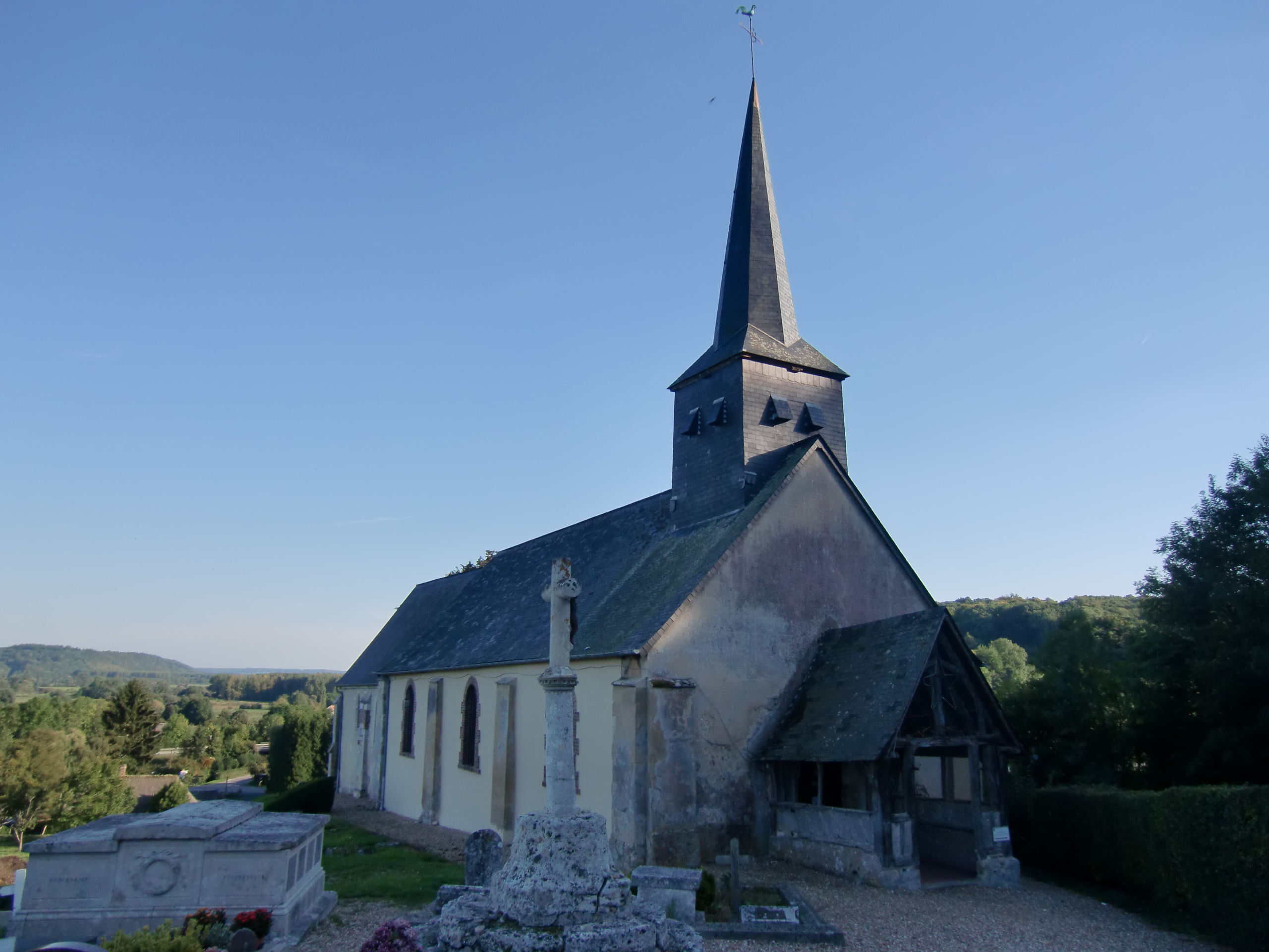 église de Foulbec (Eure, Normandie, France)